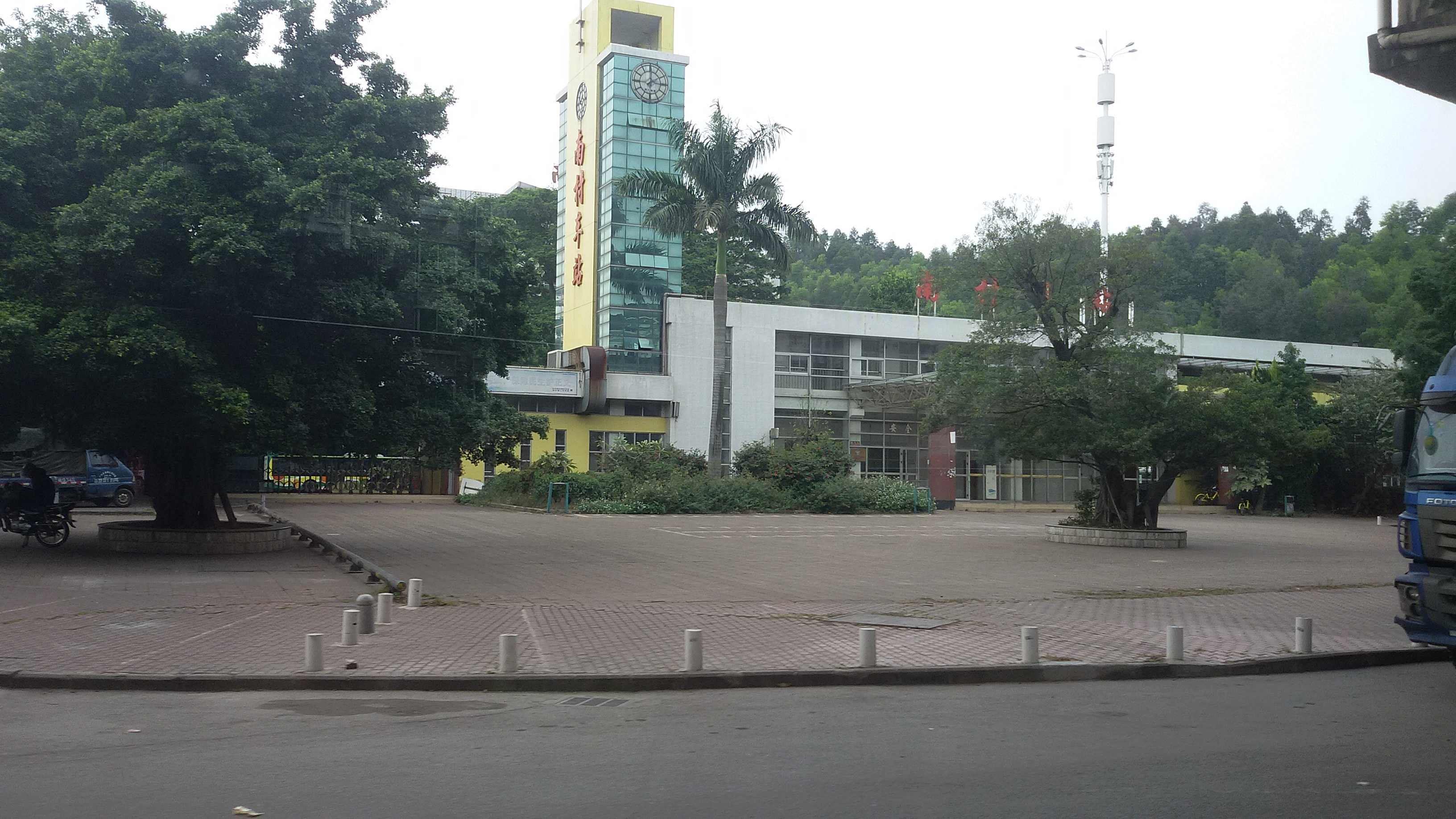 粵語: 南村汽車客運站